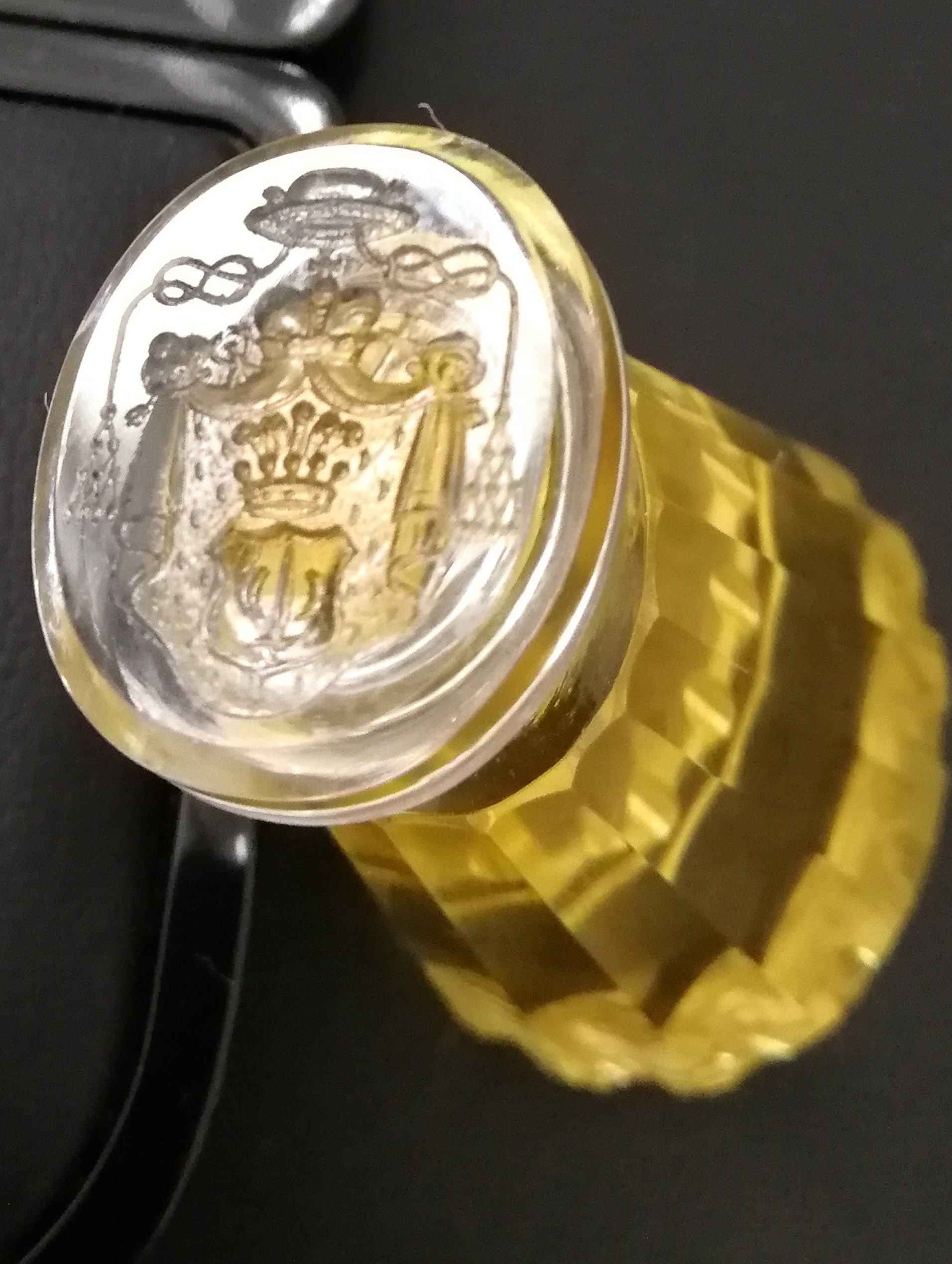 Pečetidlo biskupa Konstantyna Czechowicze - (erb na spodní části pečetidla)